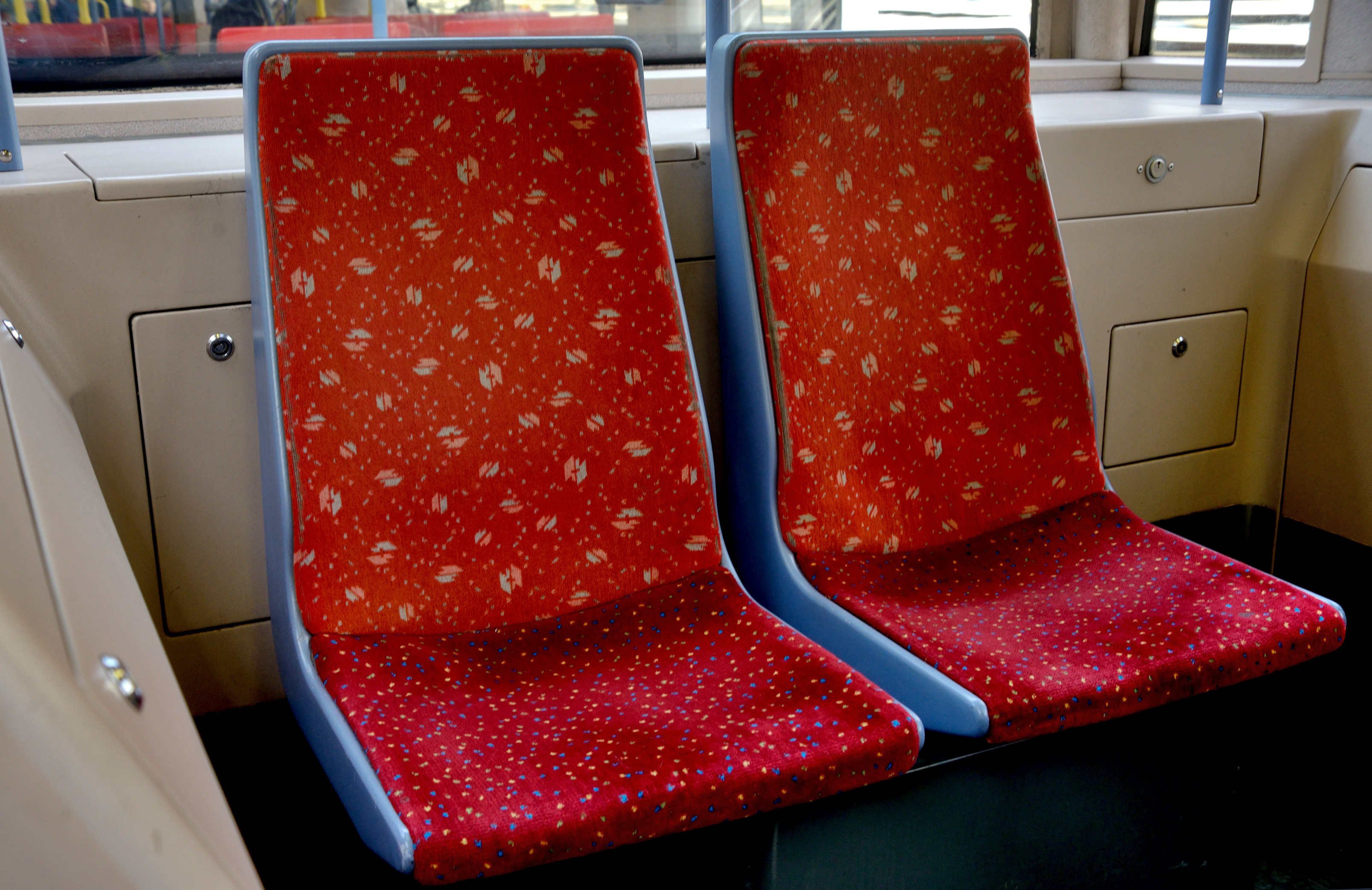 Stoffsitze im T 2644.